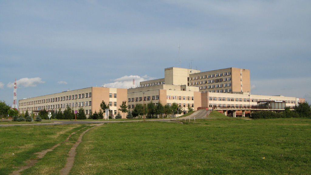 Szpital Wojewódzki w Łomży